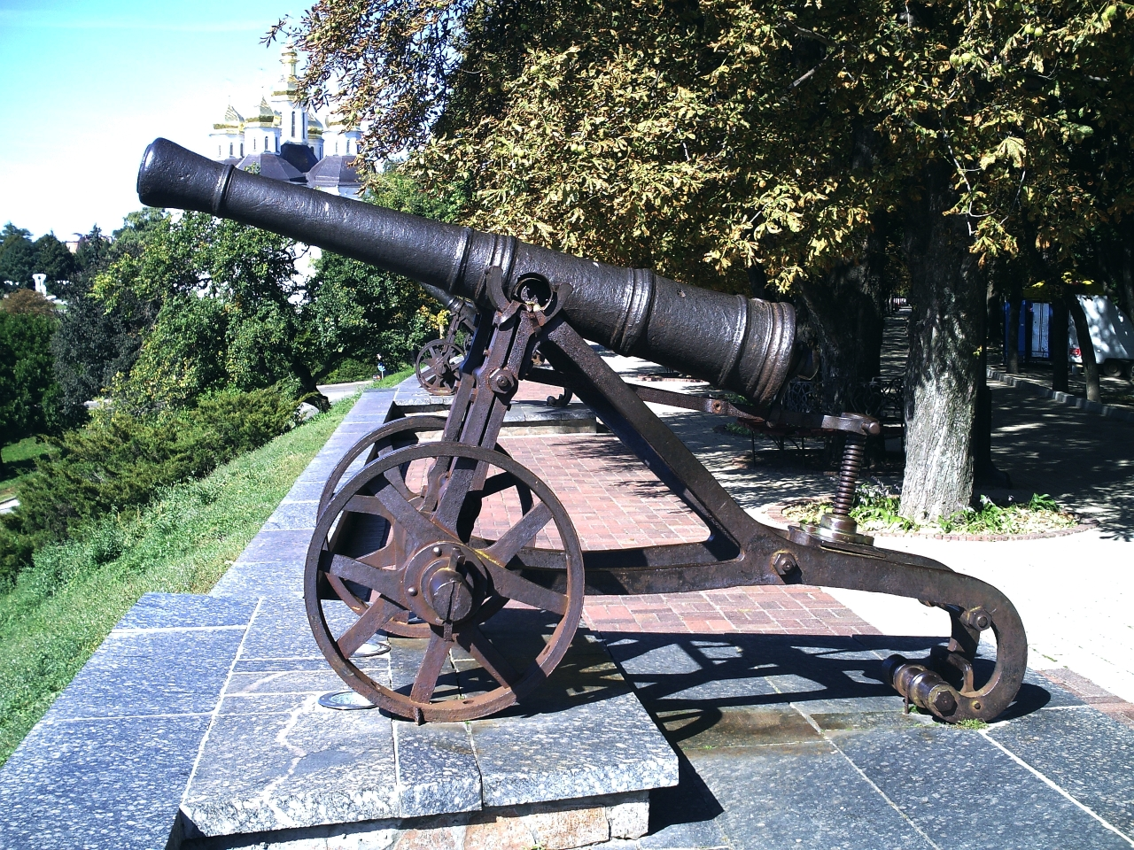 Гармата встановленна на Валу міста Чернігова